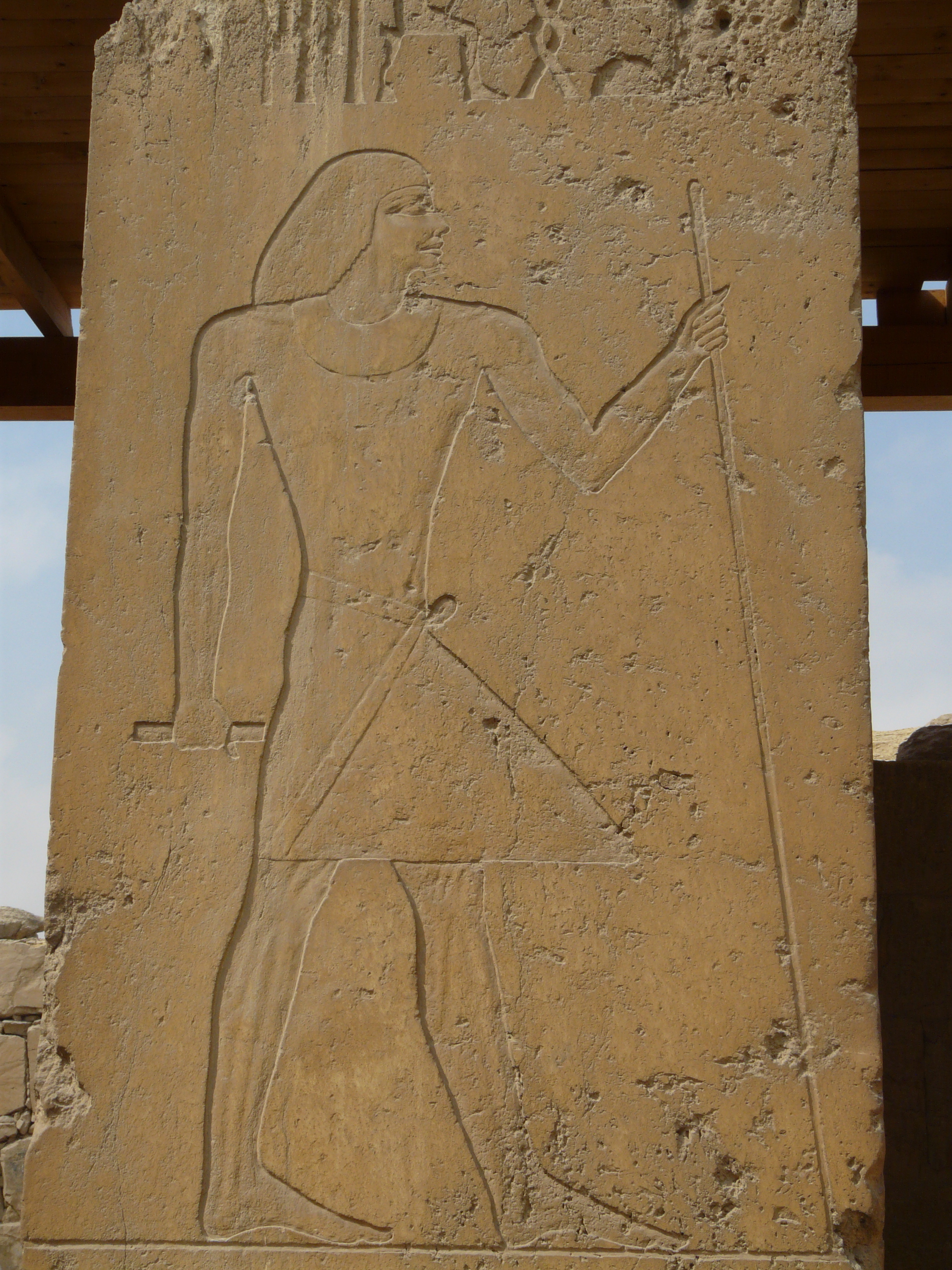 Représentation de Ptahchepsès (Ve dynastie) sur une colonne de la cour centrale de son mastaba - Abousir